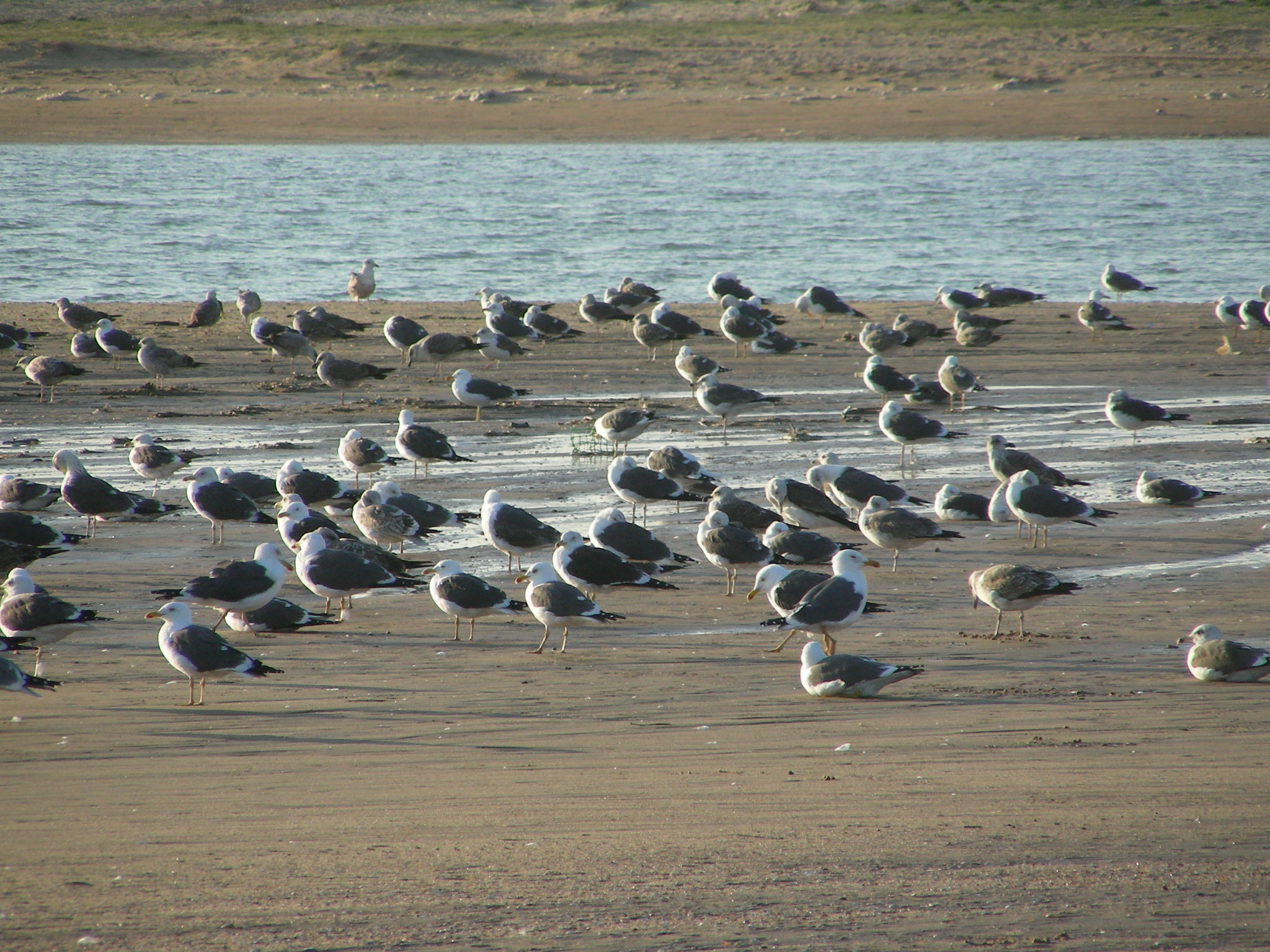 Gaviotas sobre la arena